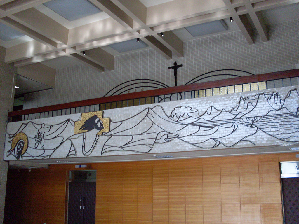 輔大野聲樓